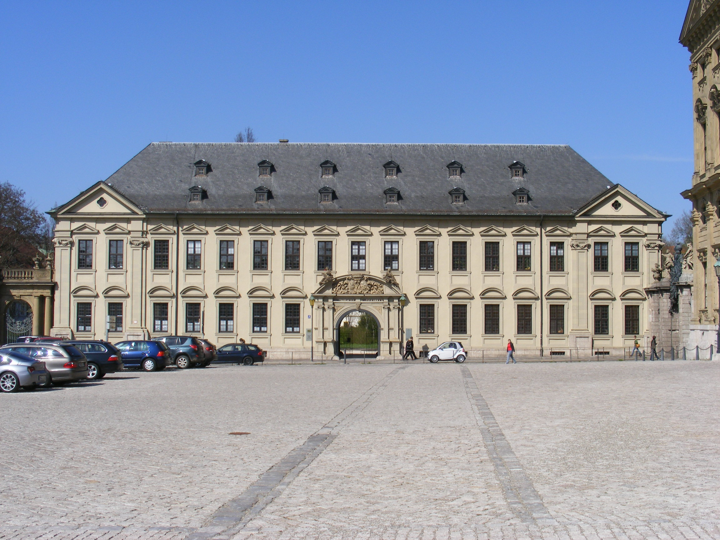 Würzburg - Rosenbachpalais, Verwaltungsgebäude des Staatlichen Hofkellers. Residenzplatz 3.